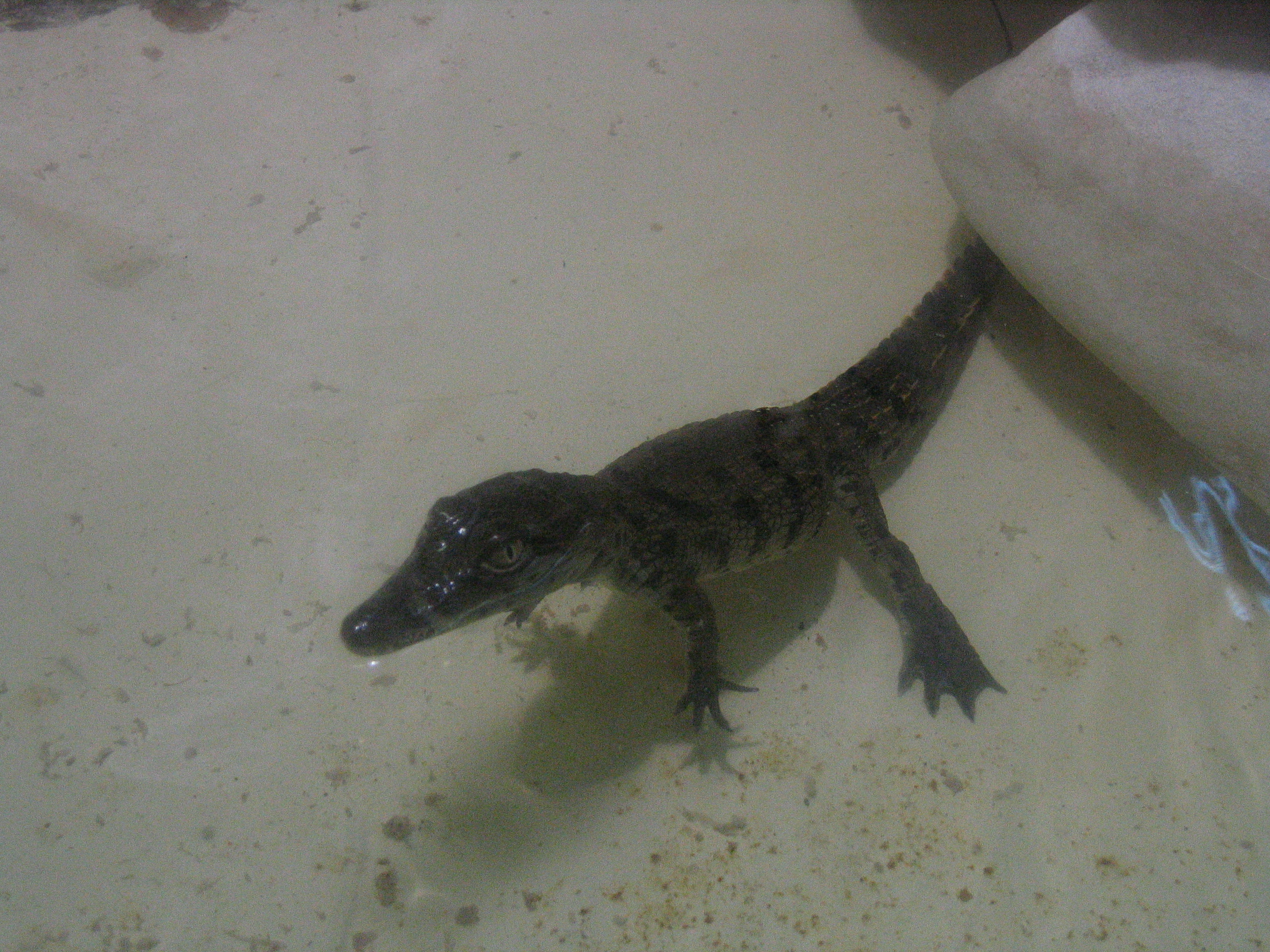 Jeune crocodile du Nil